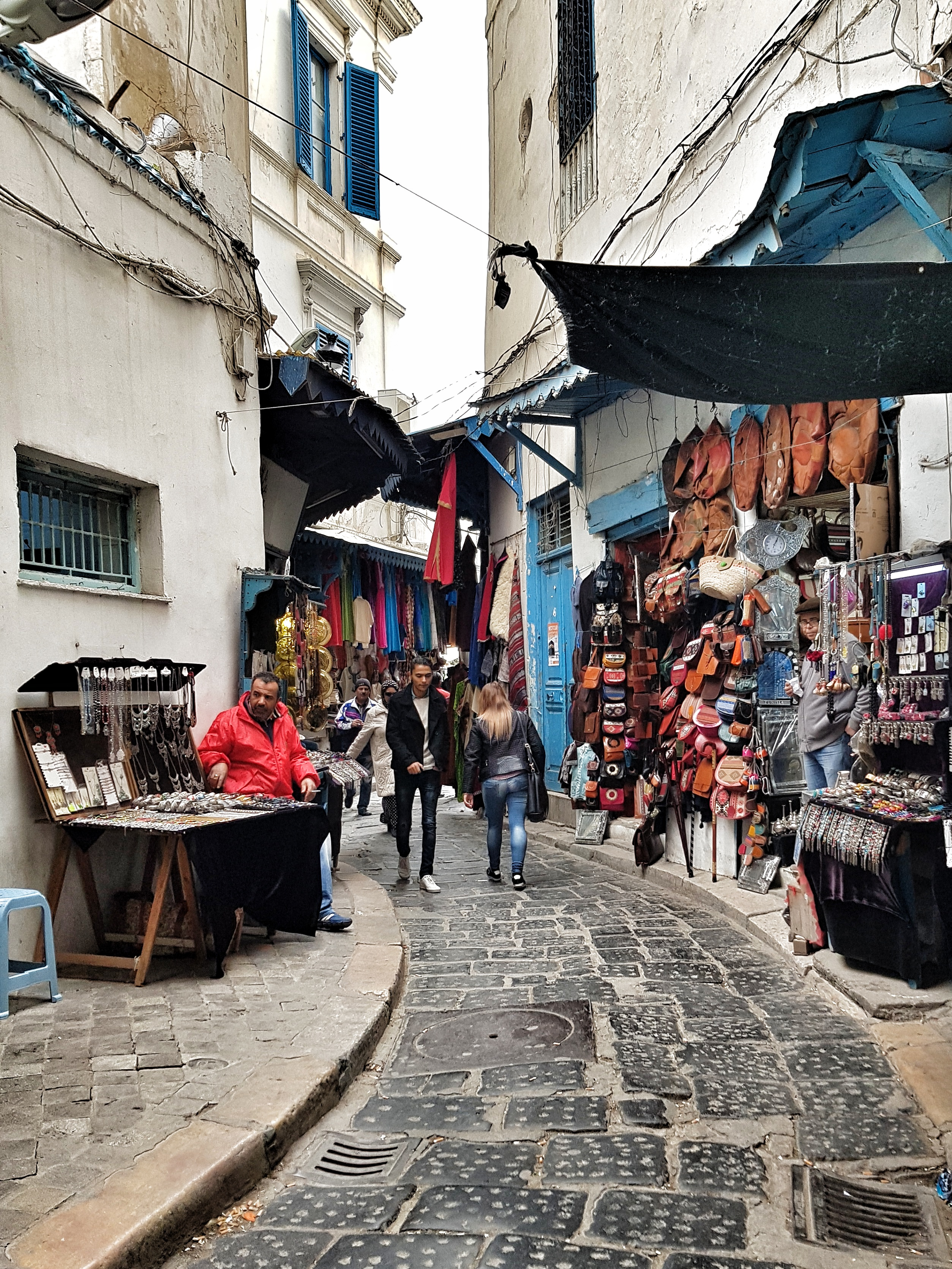 بائع اكسسوارات بنهج جامع الزيتونة This is an image of "African people at work" from Tunisia